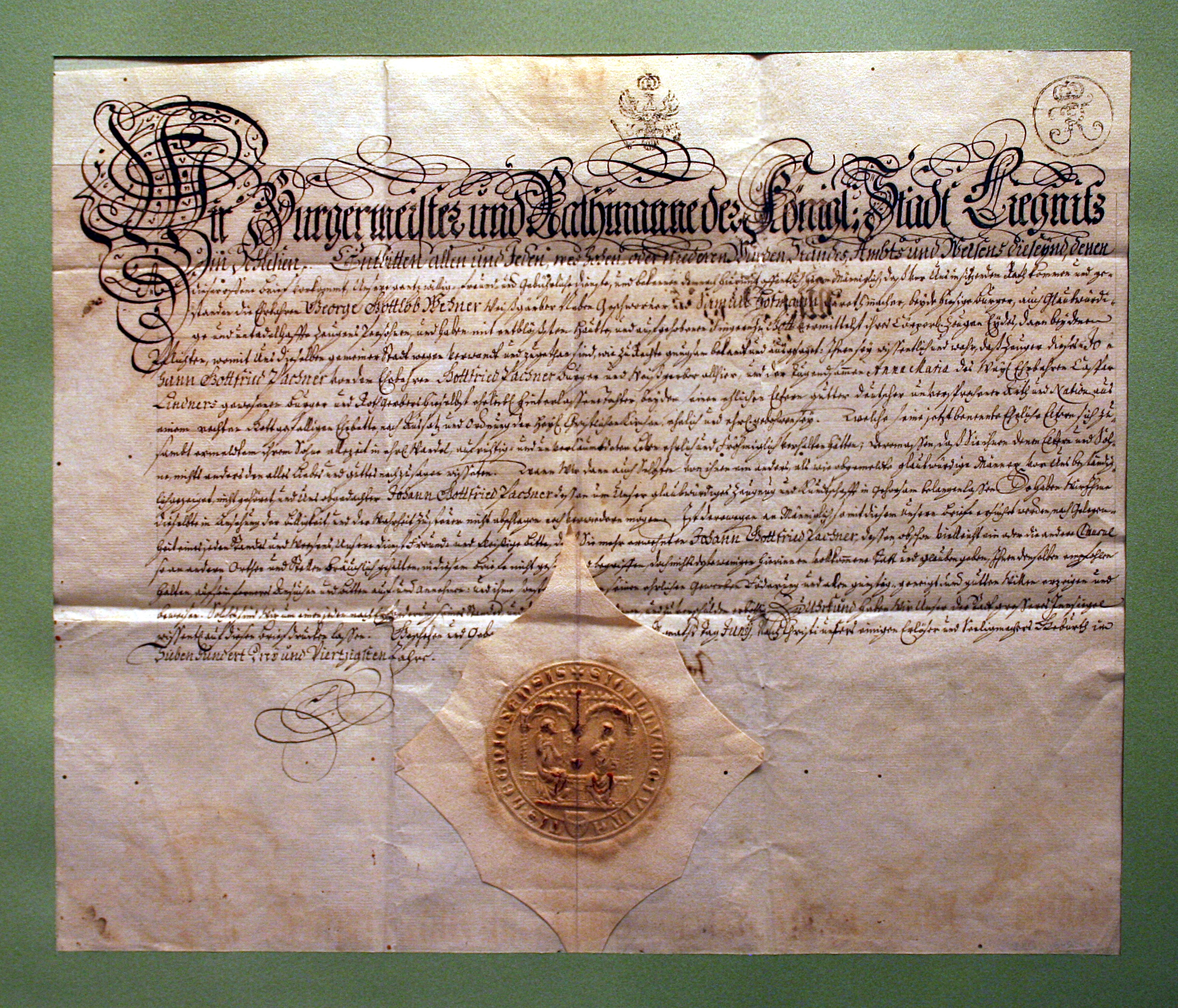 Muzeum w Rybniku podczas Nocy Muzeów. Świadectwo dobtrego urodzenia wystawiane czeladnikowi.